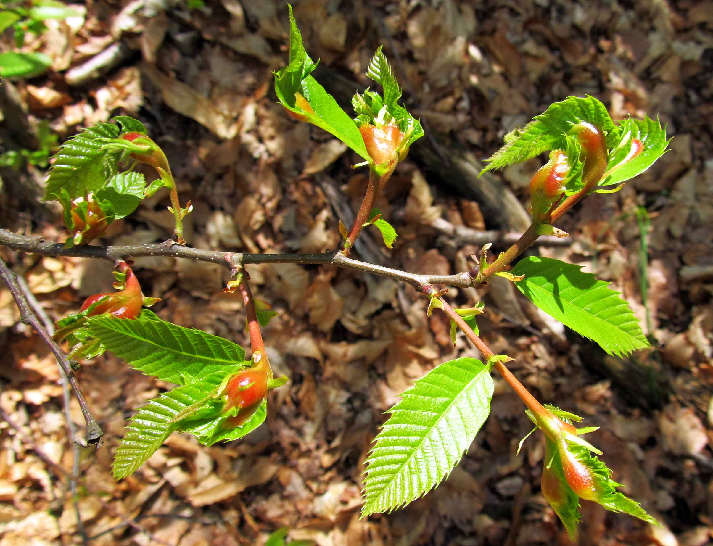 Dryocosmus kuriphilus, galle su castagno (collina di Borgo d'Ale, VC)